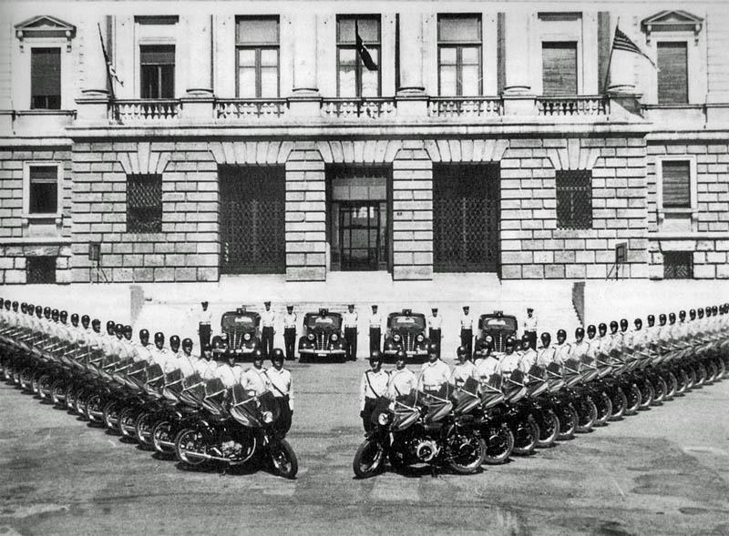 Venezia Giulia Police Force al tribunale di Trieste